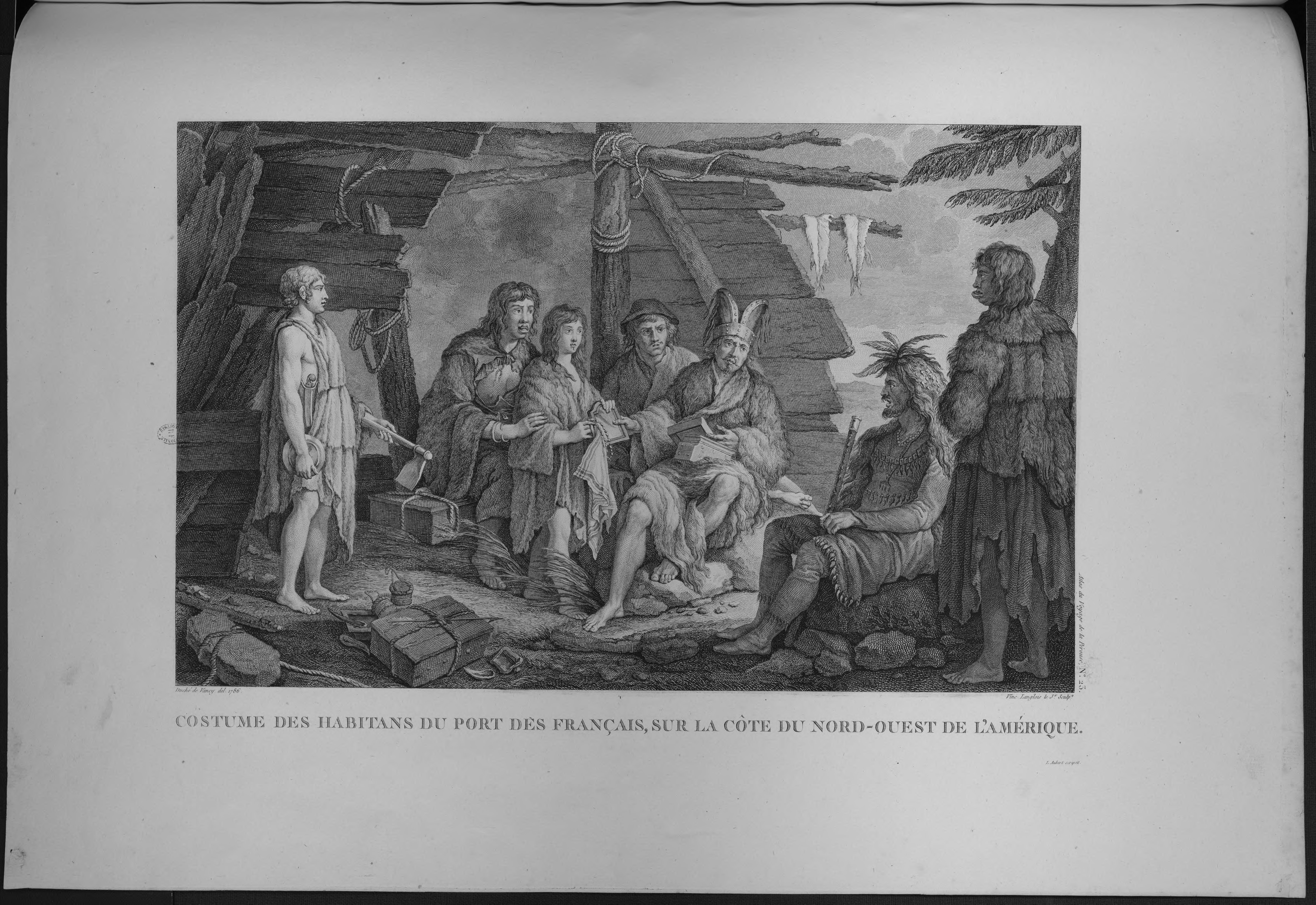 Atlas du voyage de La Pérouse